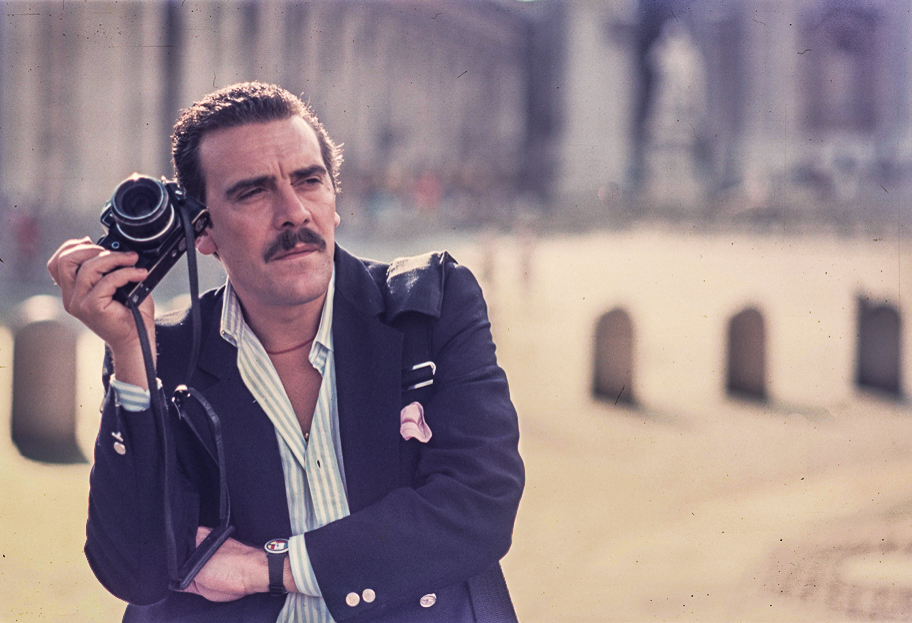 Barillari Rino, Archivio Barillari Story, Rino Barillari a Piazza San Pietro - Roma, GFDL